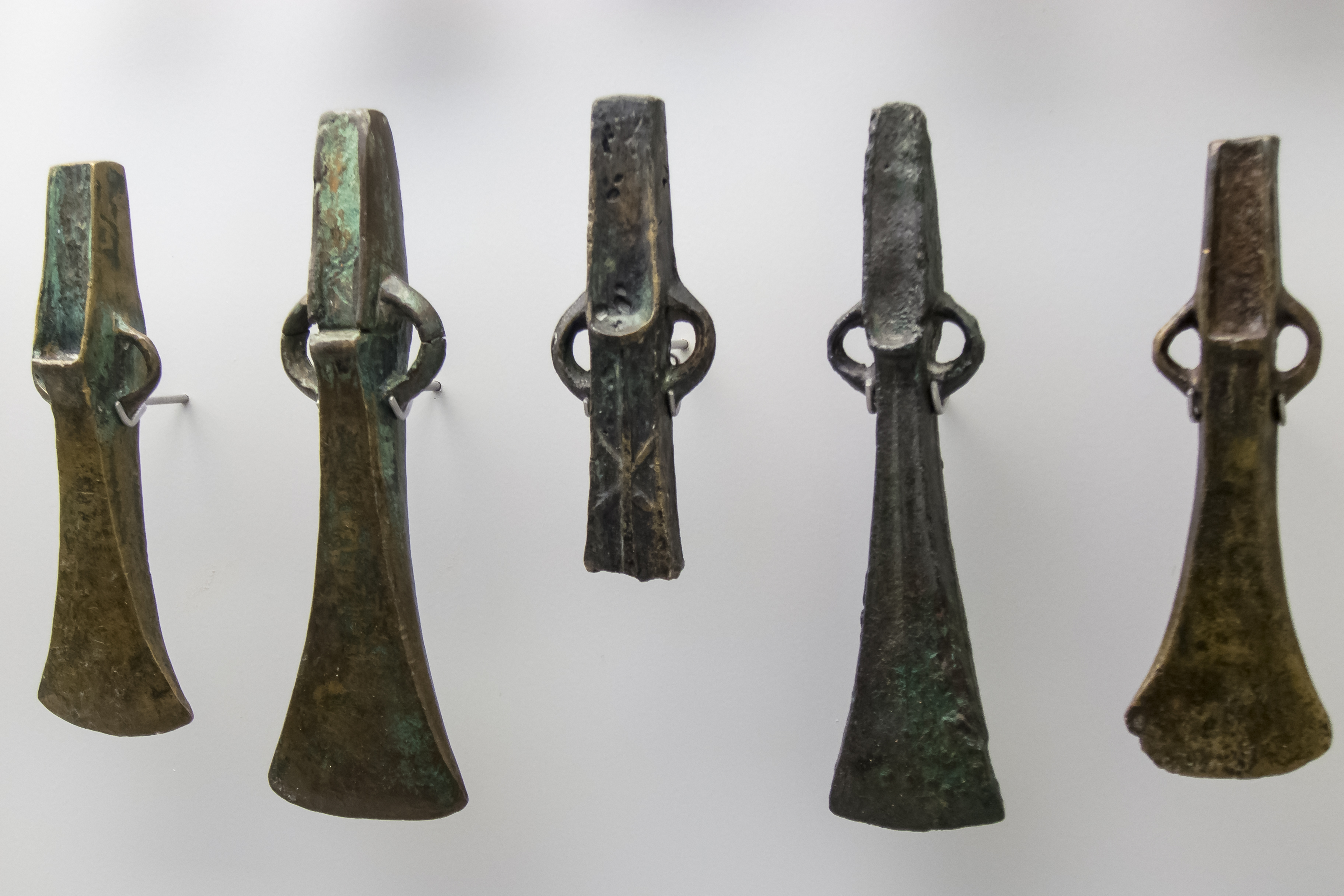 Museo Arqueológico de Asturias, Oviedo. Hachas de talón y anillas. Edad de Bronce final. Asturias.